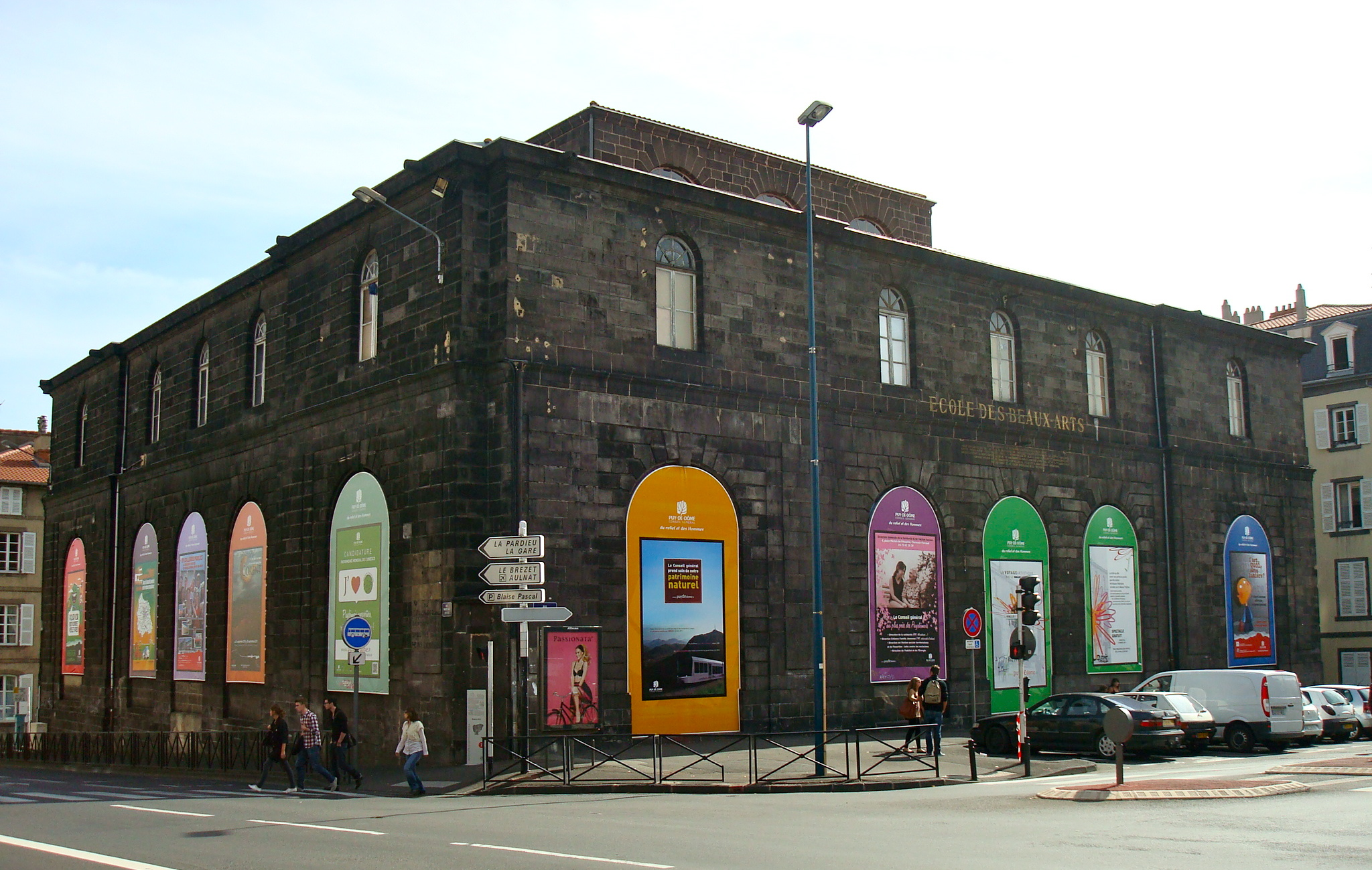 Halle aux Blés, 11 rue Ballainvilliers, Clermont-Ferrand .